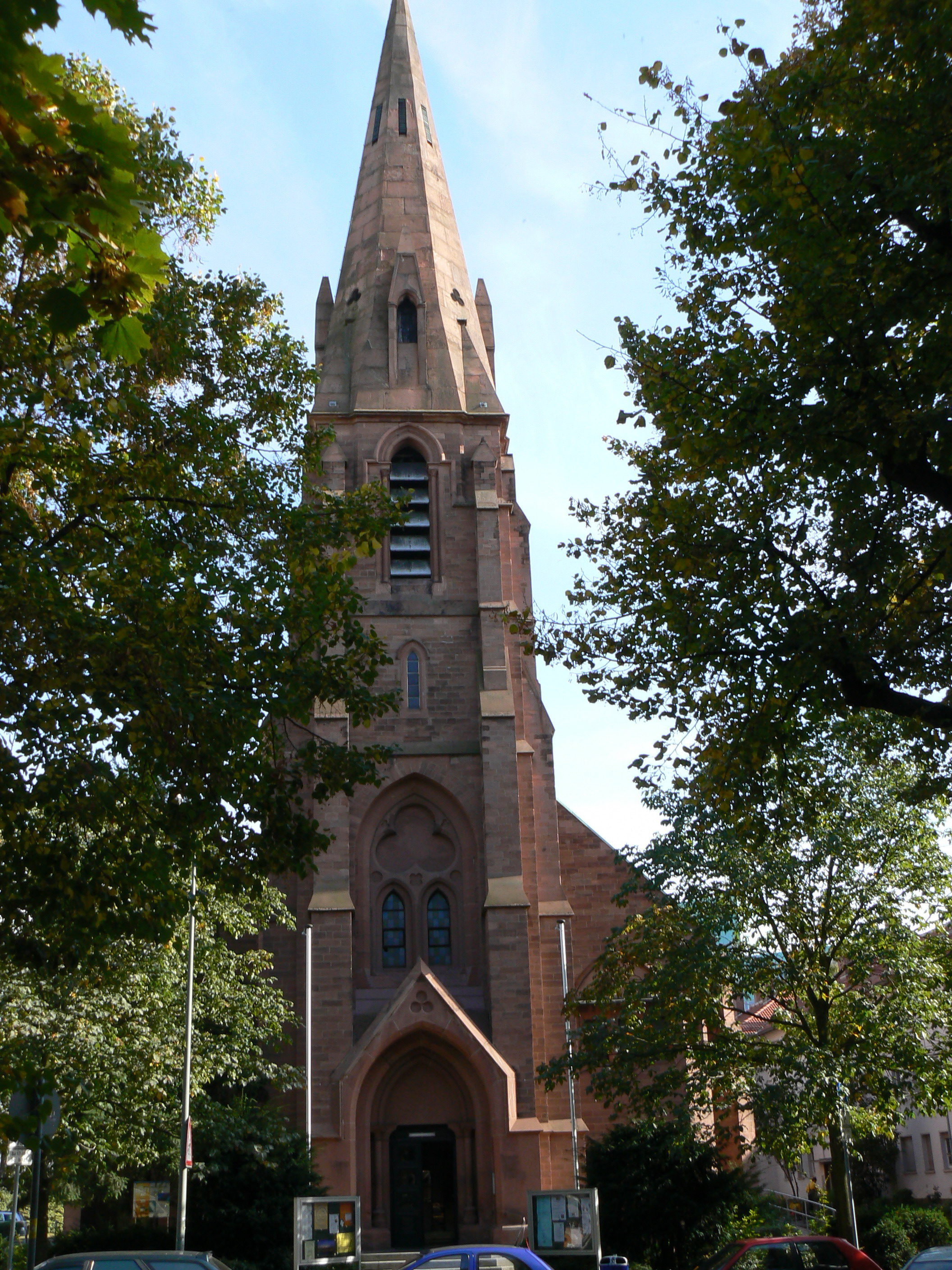 kath.St.Eisabethkirche am Kurfürstenplatz